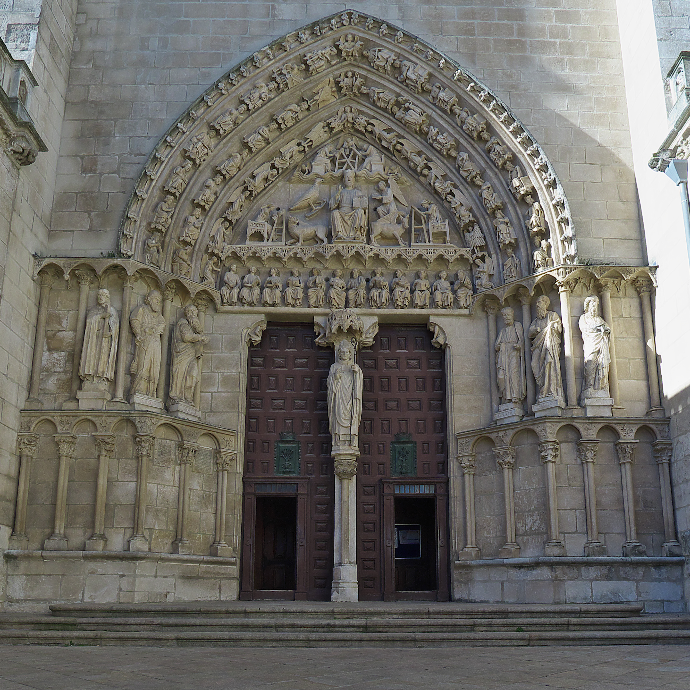 Puerta del transepto meridional (1240). Fernando III de Castilla y Mauricio (obispo de Burgos), conocían la innovadora arquitectura ojival francesa, debido a los diversos viajes a Alemania para los encuentros con Beatriz de Suabia, futura esposa del rey santo. Esta puerta, cuya traza arquitectónica es atribuible al maestro Enrique, la primitiva de la fábrica catedralicia, presenta una clara filiación artística con la Portada Real de la Catedral de Chartres, con las existentes en la Catedral de Amiens o con la portada del transepto norte de la Catedral de Reims. La composición temática de su soberbio tímpano, al igual que en Pórtico de la Gloria, desarrolla la visión apocalíptica de Cristo Juez, prodigado en la escultura románica.